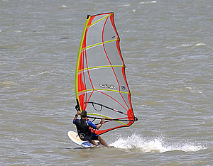 Planche de funboard actuelle Photo issue de ma banque d'images personnelle : Pep.per